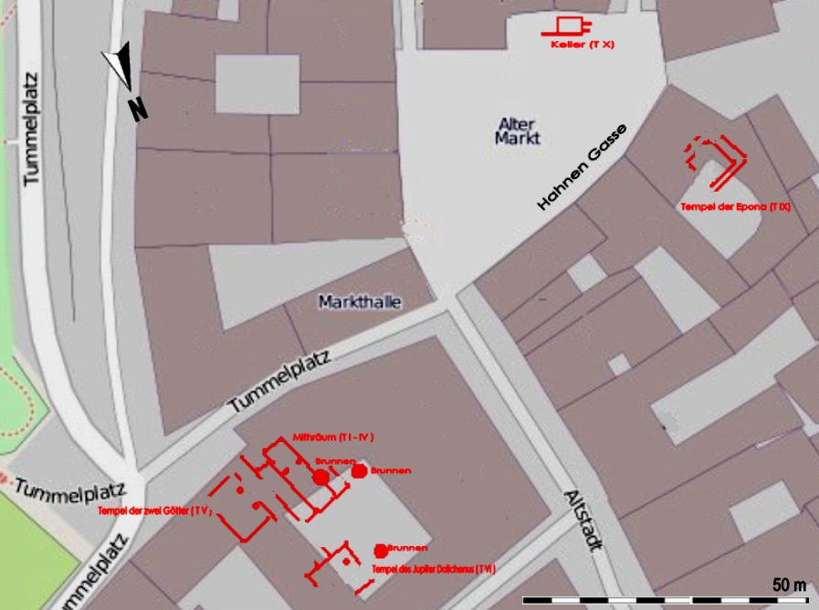 Lage der Kultbauten im Tempelbezirk des antiken Lentia in der heutigen Altstadt von Linz nach Karnitsch. Grundrisse gezeichnet mit Paint :)). Hintergrundkarte aus dem freien Internetprojekt [1]. Quellen: Paul Karnitsch: Historisches Jahrbuch der Stadt Linz, Tafel 1, S. 259, Stadt Linz (Hrsg.), Städtische Sammlungen, Linz 1956.